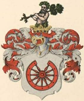 Fölkersahmi suguvõsa aadli- ja parunivapp